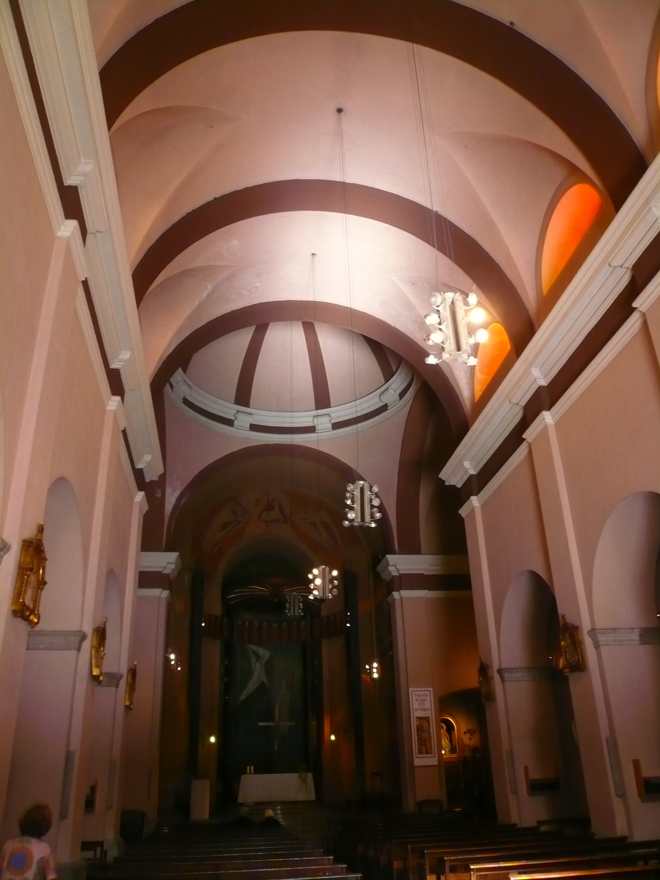 Església de la Mare de Déu de Gràcia i Sant Josep (Barcelona) Object location41° 24′ 24.09″ N, 2° 08′ 55.89″ E